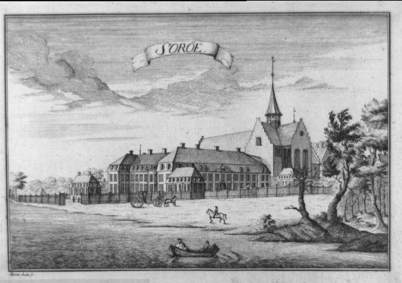 Soröe, kobberstik af Lode, Alexia v., Emner: Sorø akademi og kirke - Danmark - Vestsjællands amt